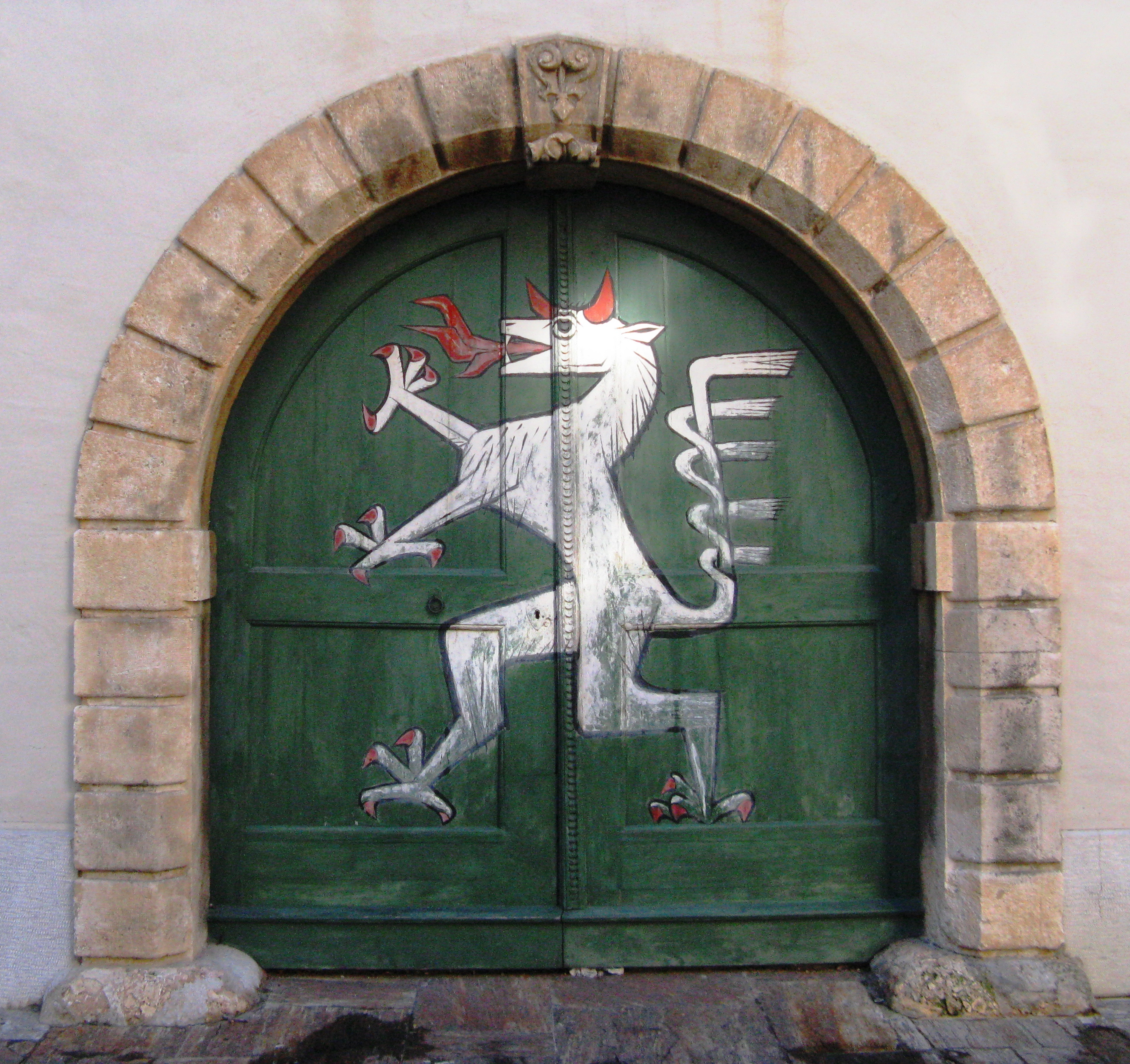 Steirisches Landeswappen, gemalt auf eine Holztür im Grazer Landhaushof